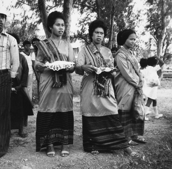 Negatief. Vrouwen in feestkleding wachten tijdens een roeiwestrijd op de binnenkomst van de prauw van hun dorp